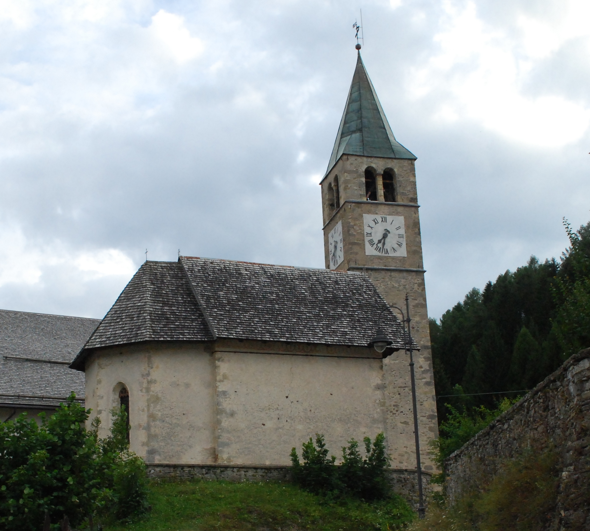 Chiesa della Madonna della Difesa a Vigo_di_Cadore - 1513